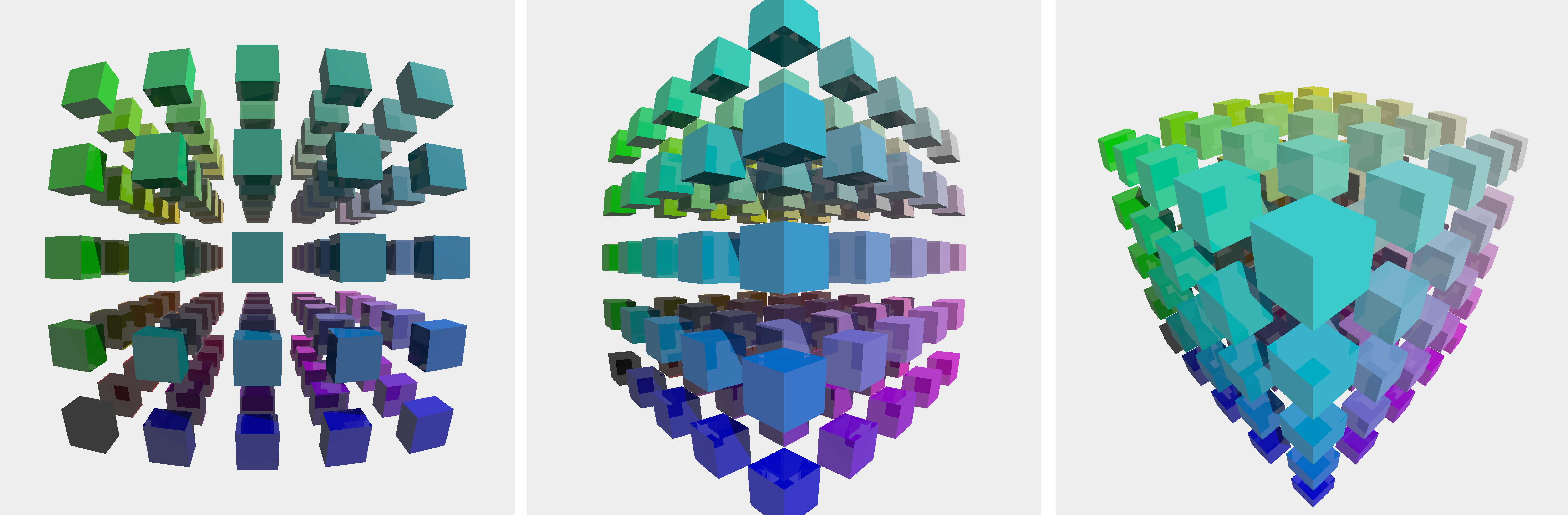 Một ví dụ ảnh phép chiếu toàn cành. Có 125 khối lập phương trong cấu trúc lập phương 5×5×5. Ảnh kết xuất bằng phần mền doTia tôi sáng tạo. Phạm vi công cộng.